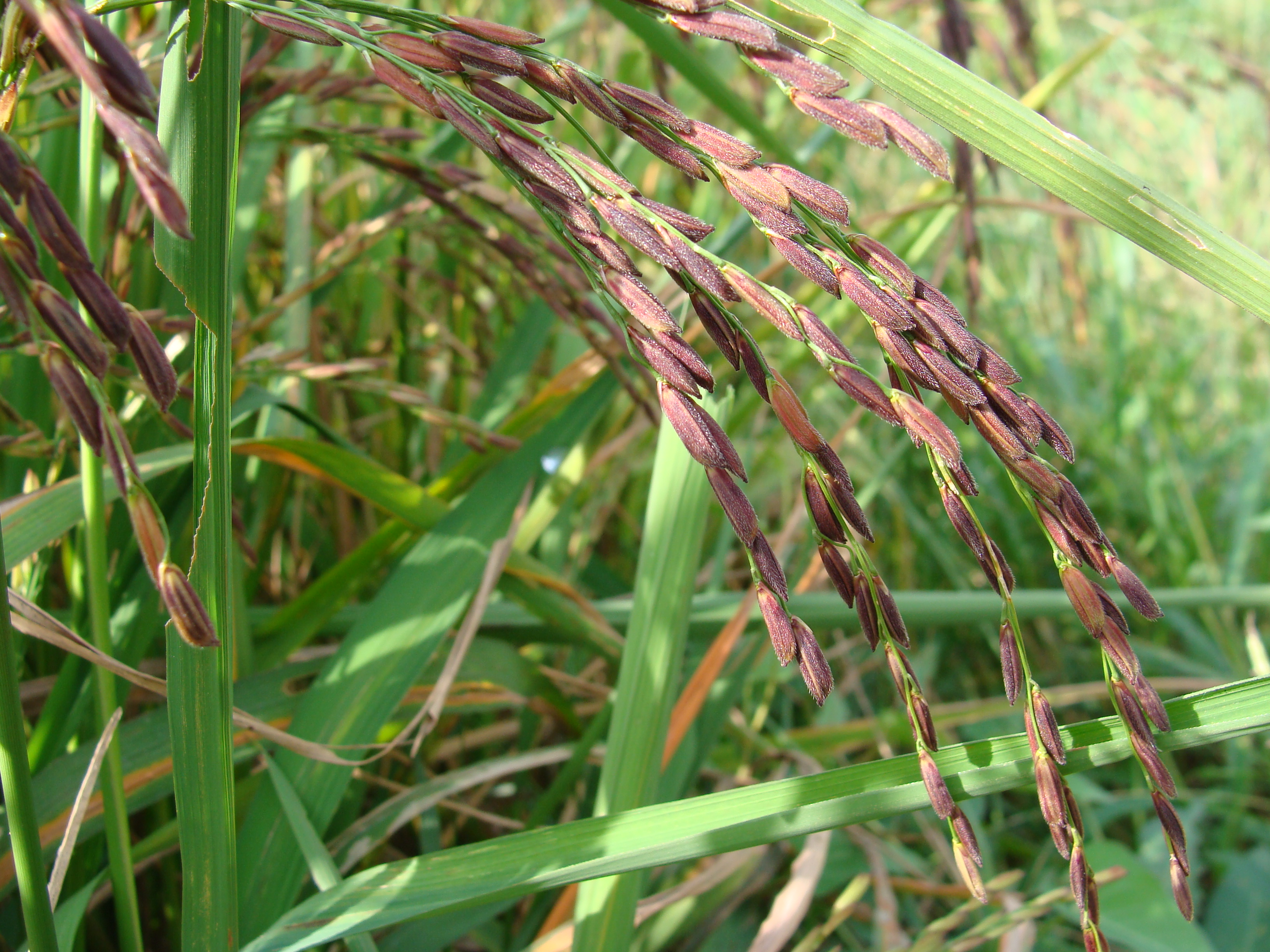 ภาพรวงข้าวไรซ์เบอร์รี่